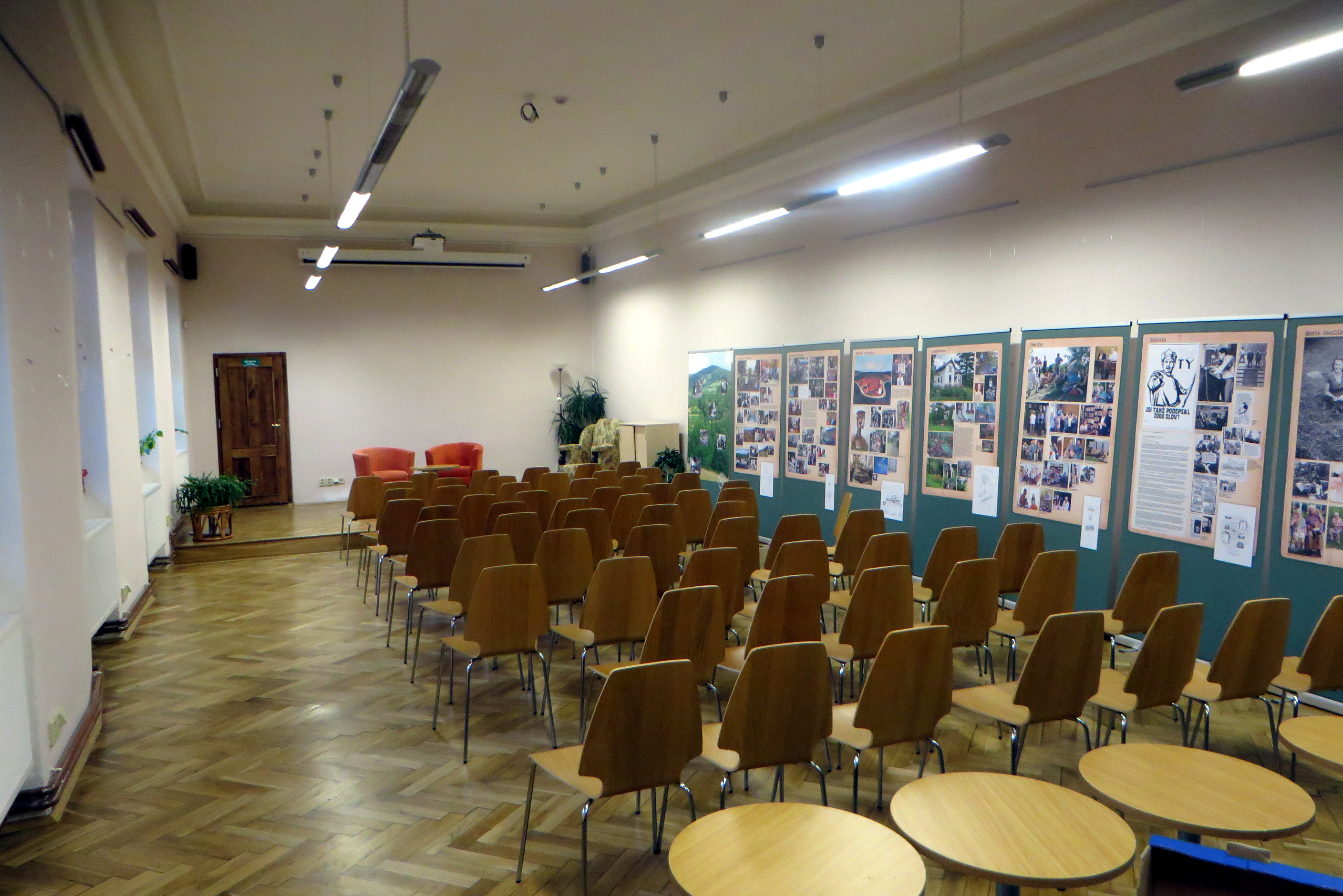 Městská knihovna v Poděbradech. Výstavní a přednáškový sál v prvním patře.